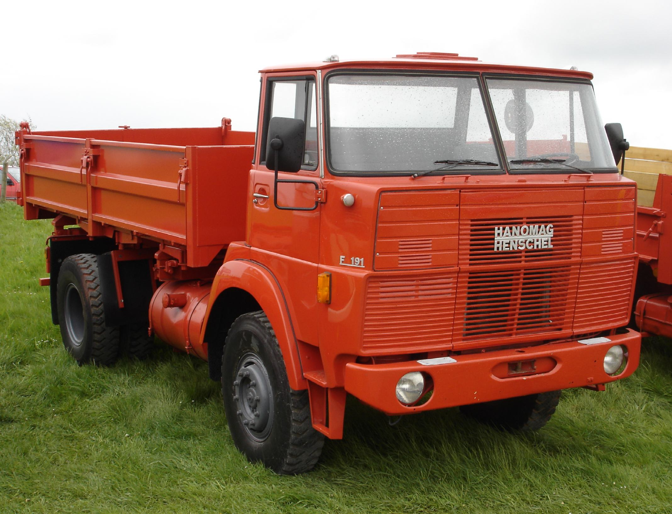 Hanomag-Henschel F191AK-Pritschenkipper